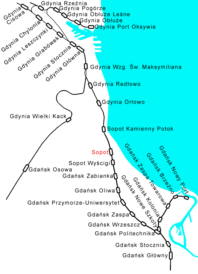 Schemat położenia stacji kolejowej Sopot.